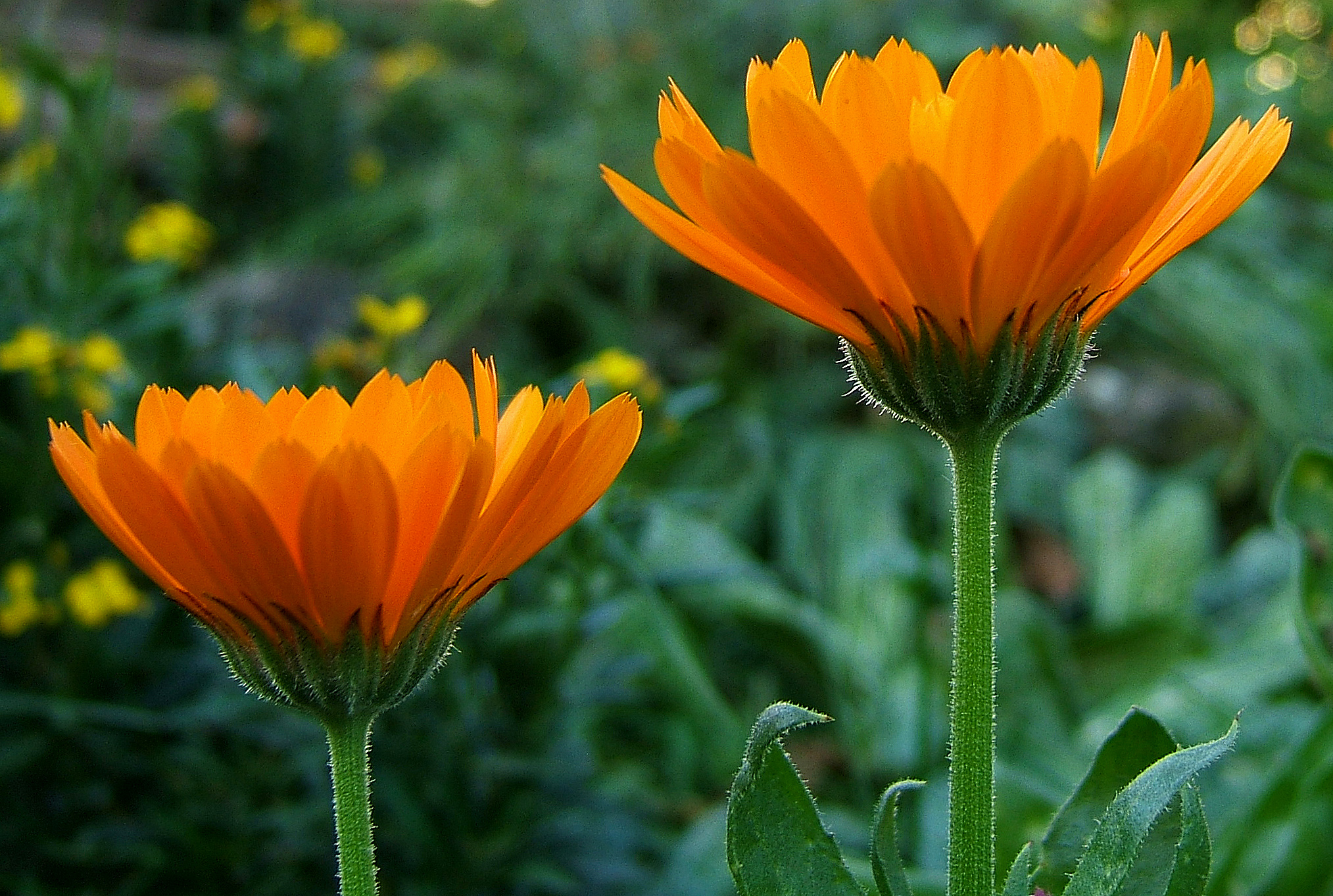 Calendula officinalis